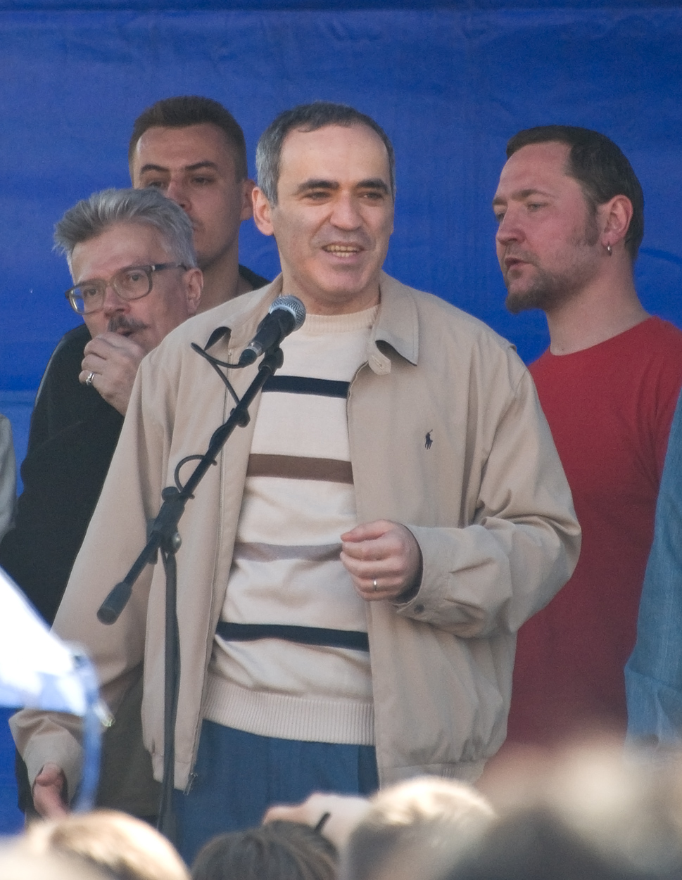 Марш несогласных в Санкт-Петербурге, 1 мая 2008, площадь Пионеров. Гарри Каспаров у микрофона, слева от него выглядывает Эдуард Лимонов.